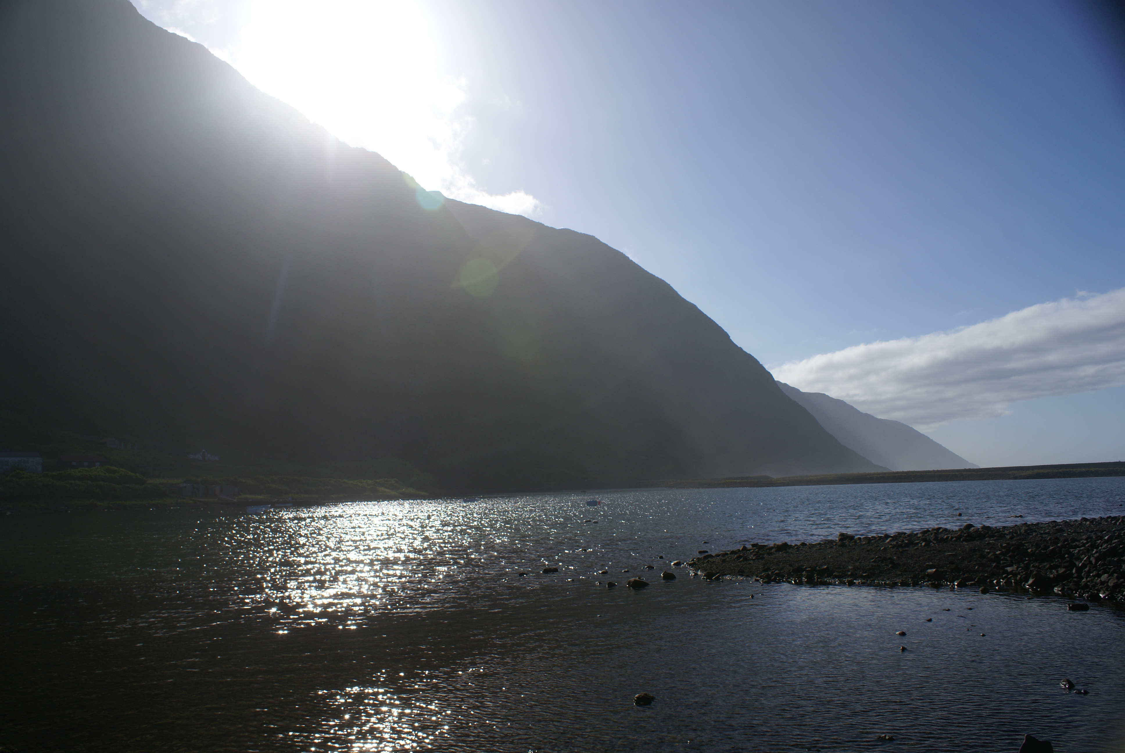 Fajã de Santo Cristo, lagoa, Calheta, ilha de São Jorge, Açores